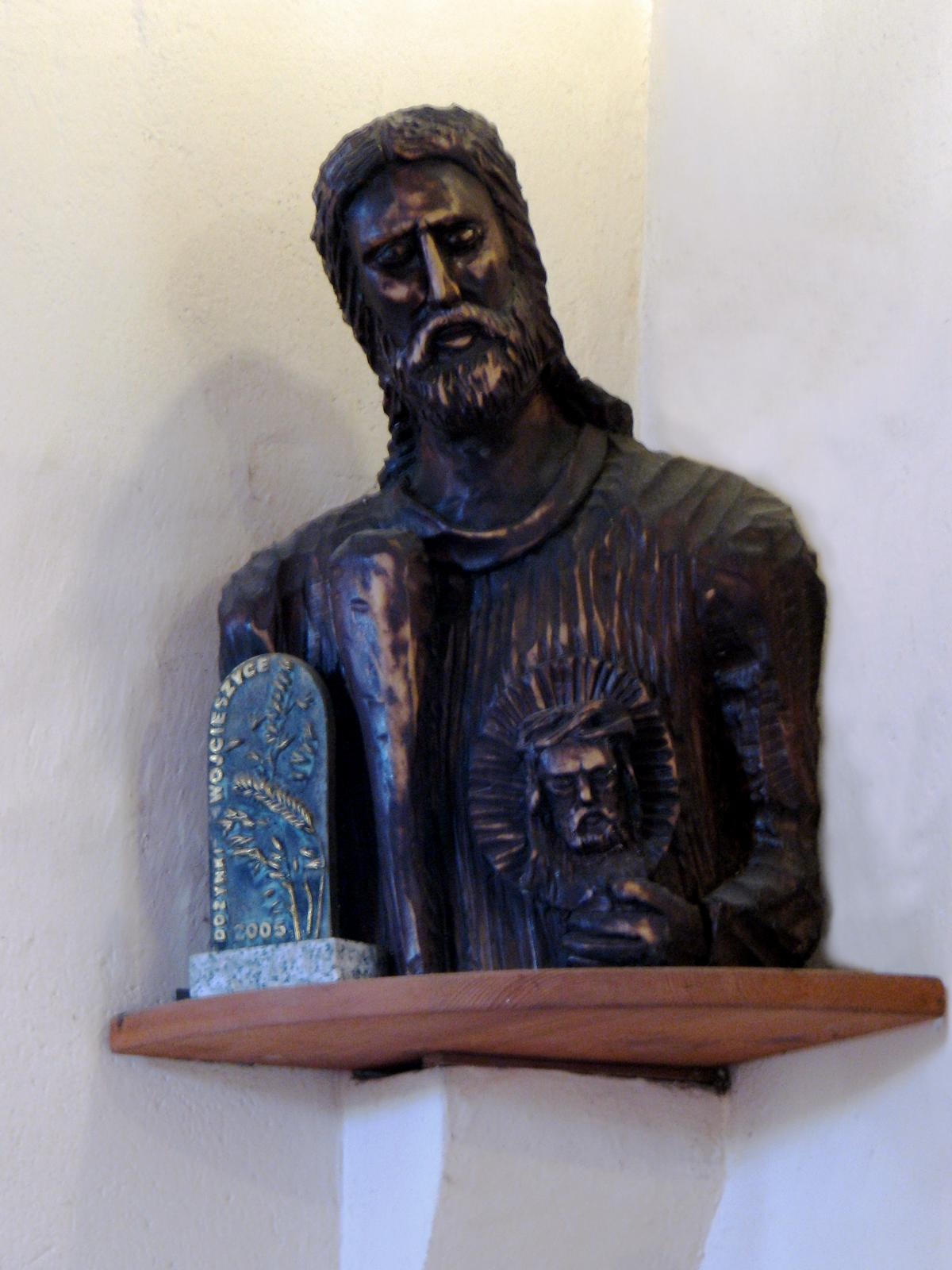 Kościół w Wojcieszycach. Rzeźba Karola Parno Gierlińskiego przedstawiająca św. Judę.